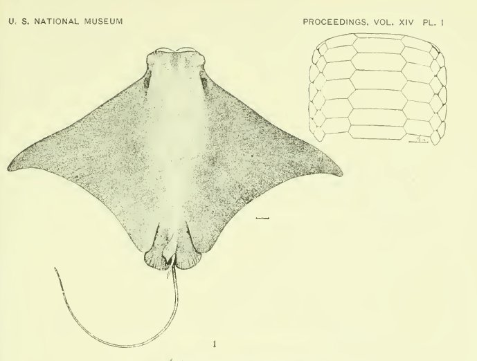 Западноамериканский бычерыл